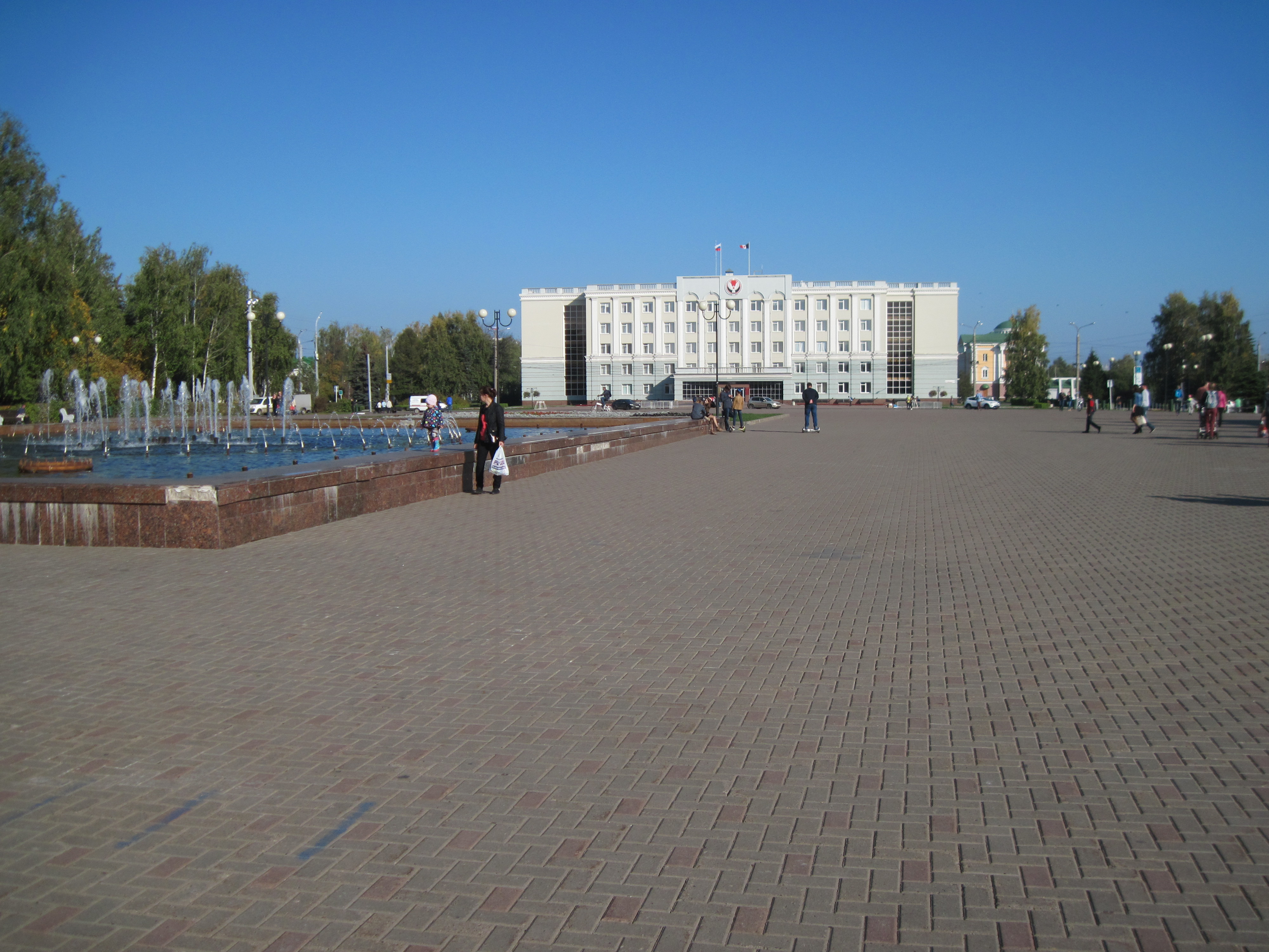 Центральная площадь